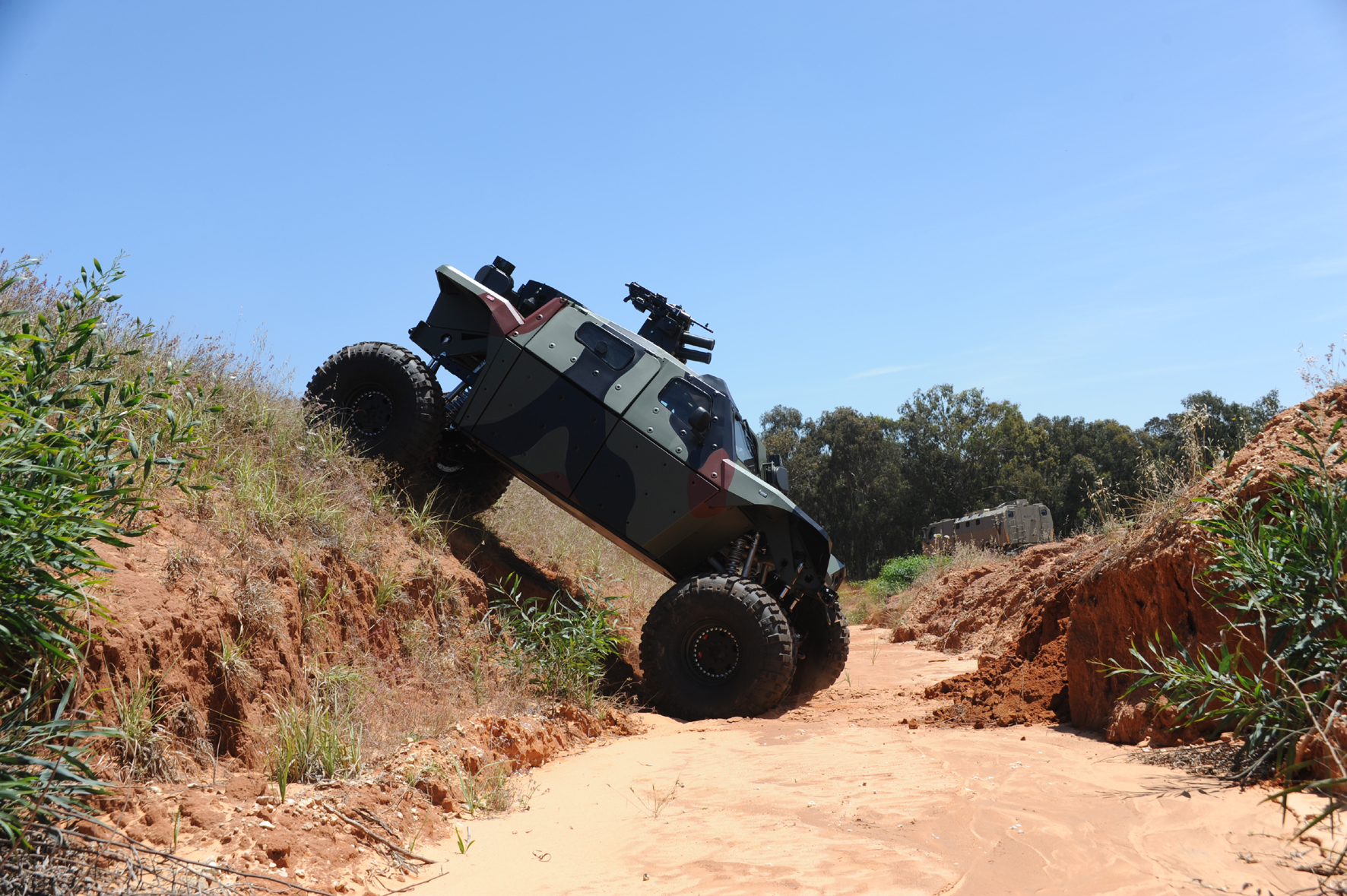 שומר ראש עם חץ זוהר